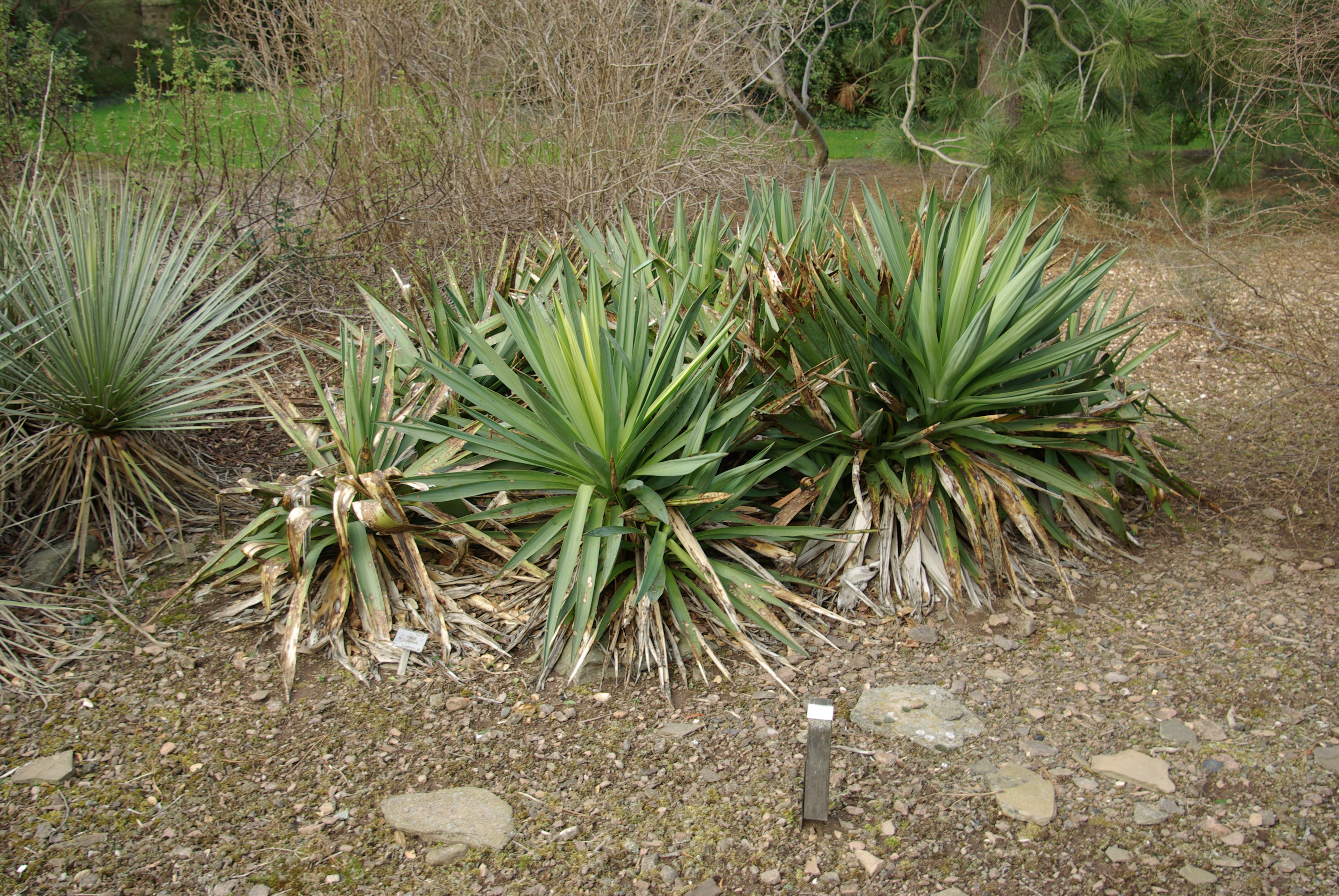 Yucca gloriosa (see also Yucca at Wikispecies)